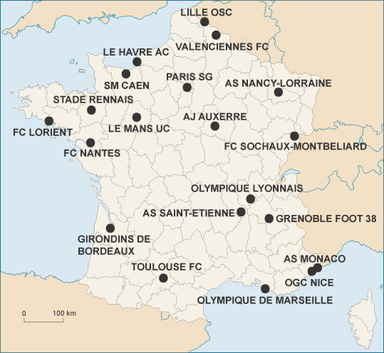 localisation des clubs de football participant au championnat de France de Ligue 1 2008-2009/localisation of soccer clubs taking part in the french championship Ligue 1 2008-2009